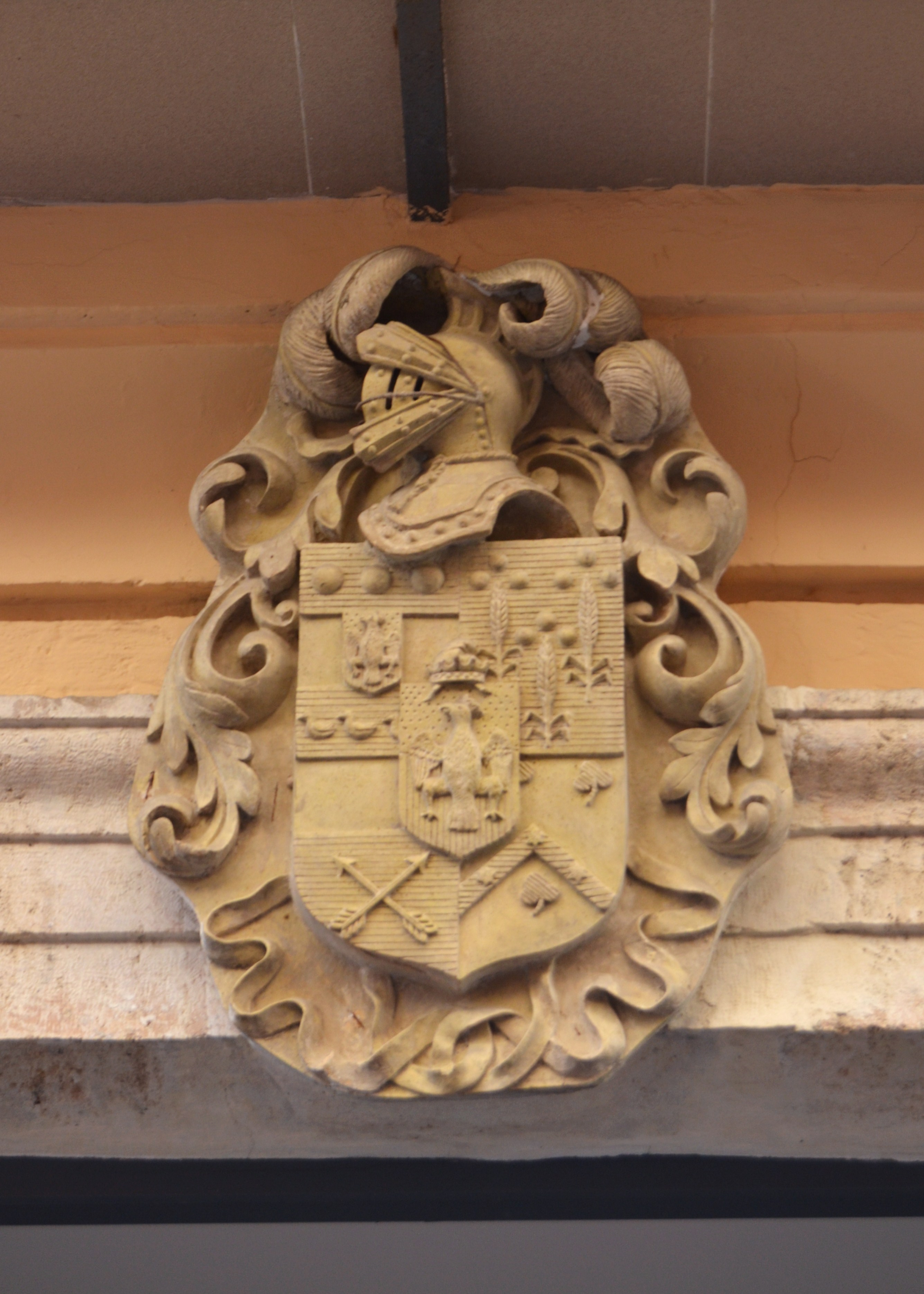 Escut del palau de Raga, València.